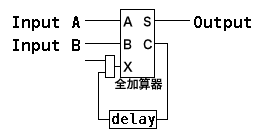 serial (binary) adder をベースに作成